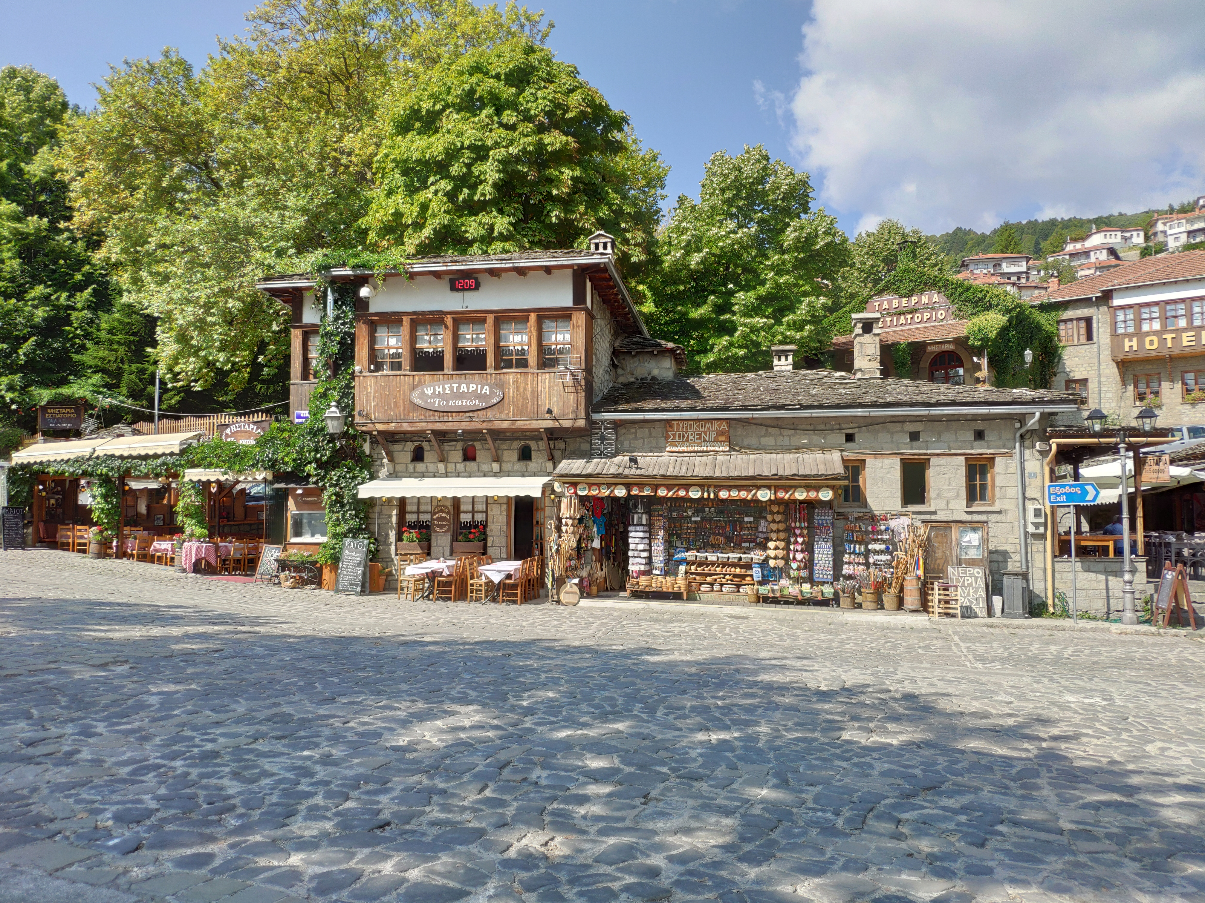 Καταστήματα κεντρικής πλατείας Μετσόβου«Καταστήματα κεντρικής πλατείας Μετσόβου»